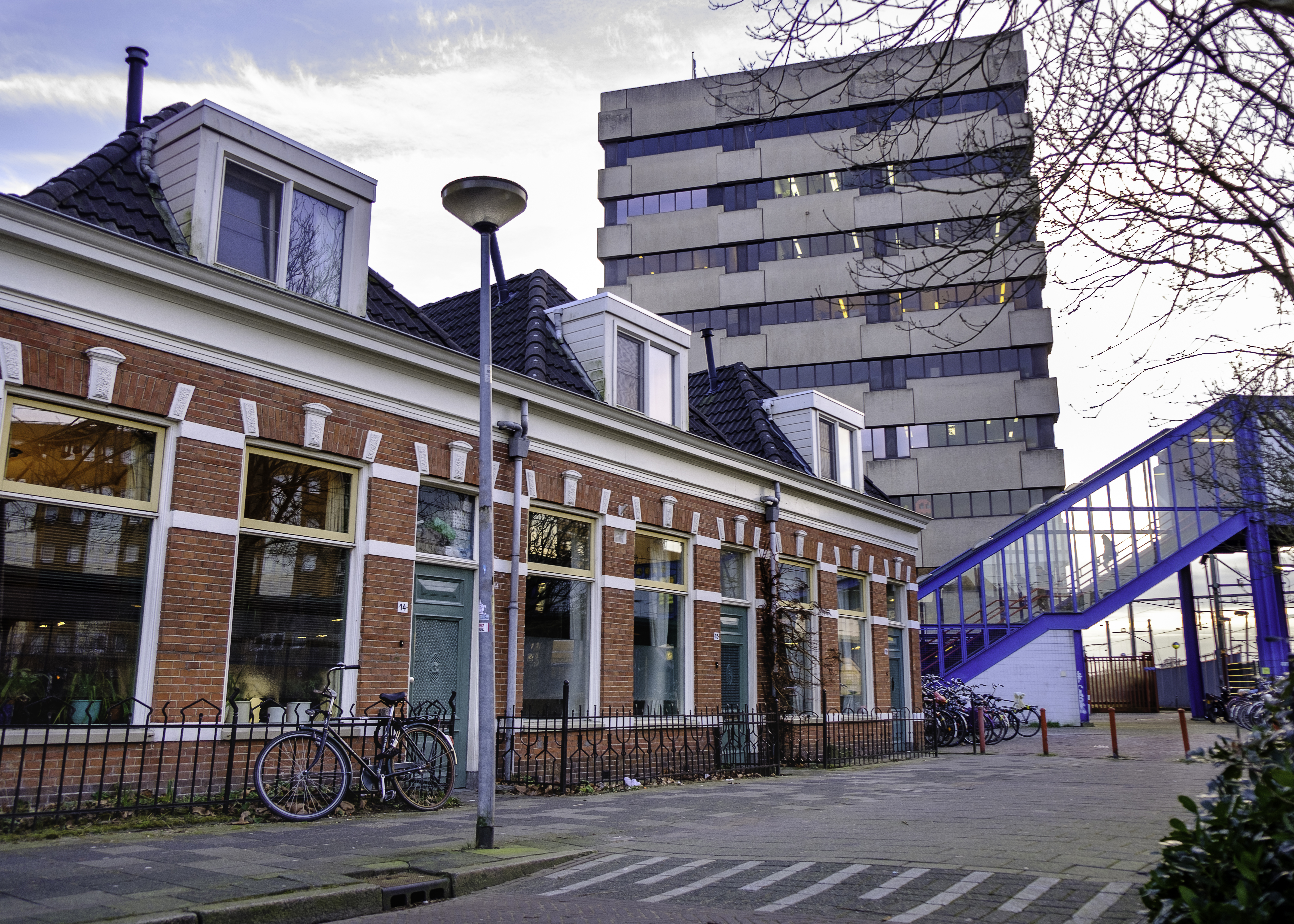 Viaductstraat in Groningen met de zuidelijke stationsingang op de achtergrond